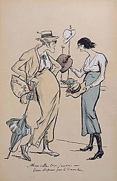 مقر الخياطة الخاص بشانيل